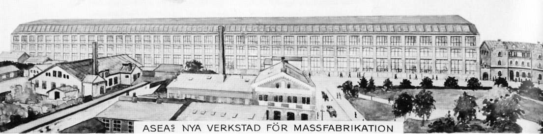 Mimerverkstaden Måste vara PD, då den nämns som "ny", och byggdes 1911-1915.